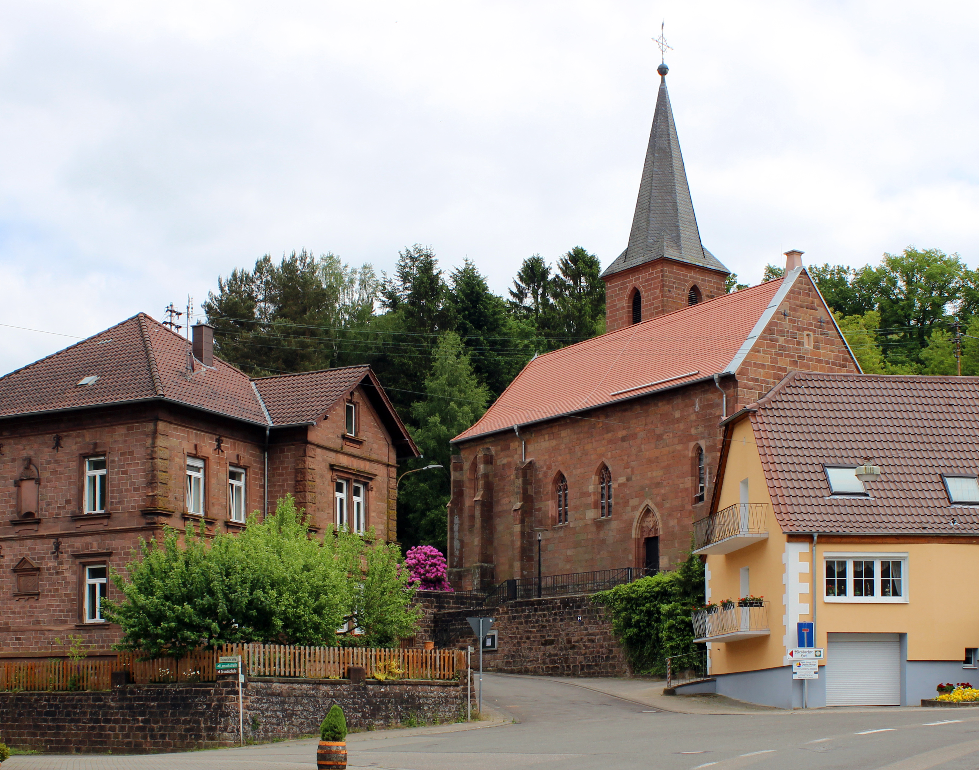 Evangelische Dietrich-Bonhoeffer-Kirche in Wiesbach (Pfalz), Landkreis Südwestpfalz, Rheinland-Pfalz